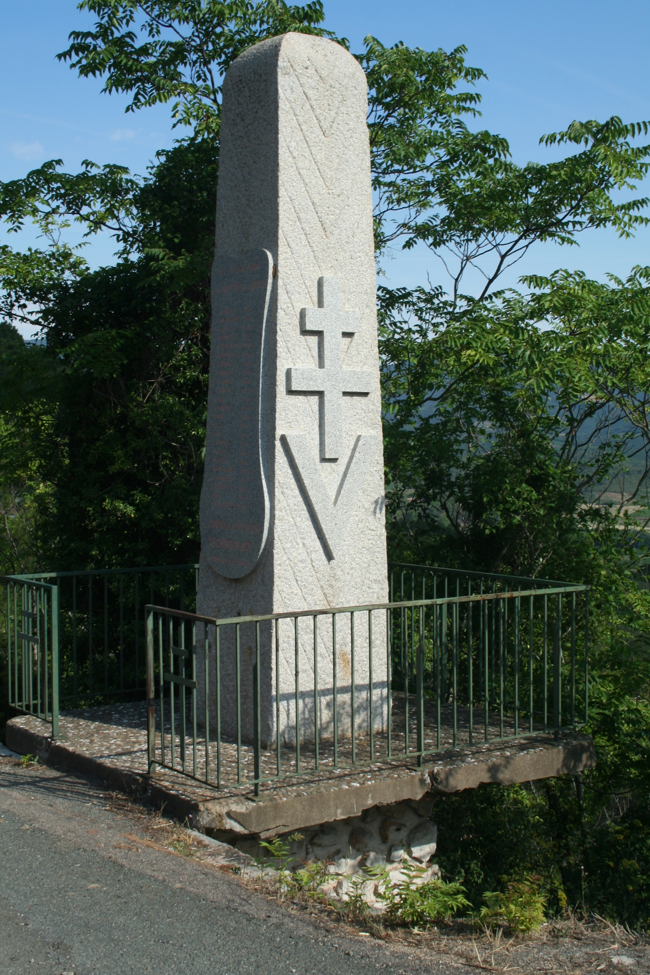 Saint-Chinian (Hérault) - mémorial de la Résistance au col de Fontjun - 6 et 7 June 1944.